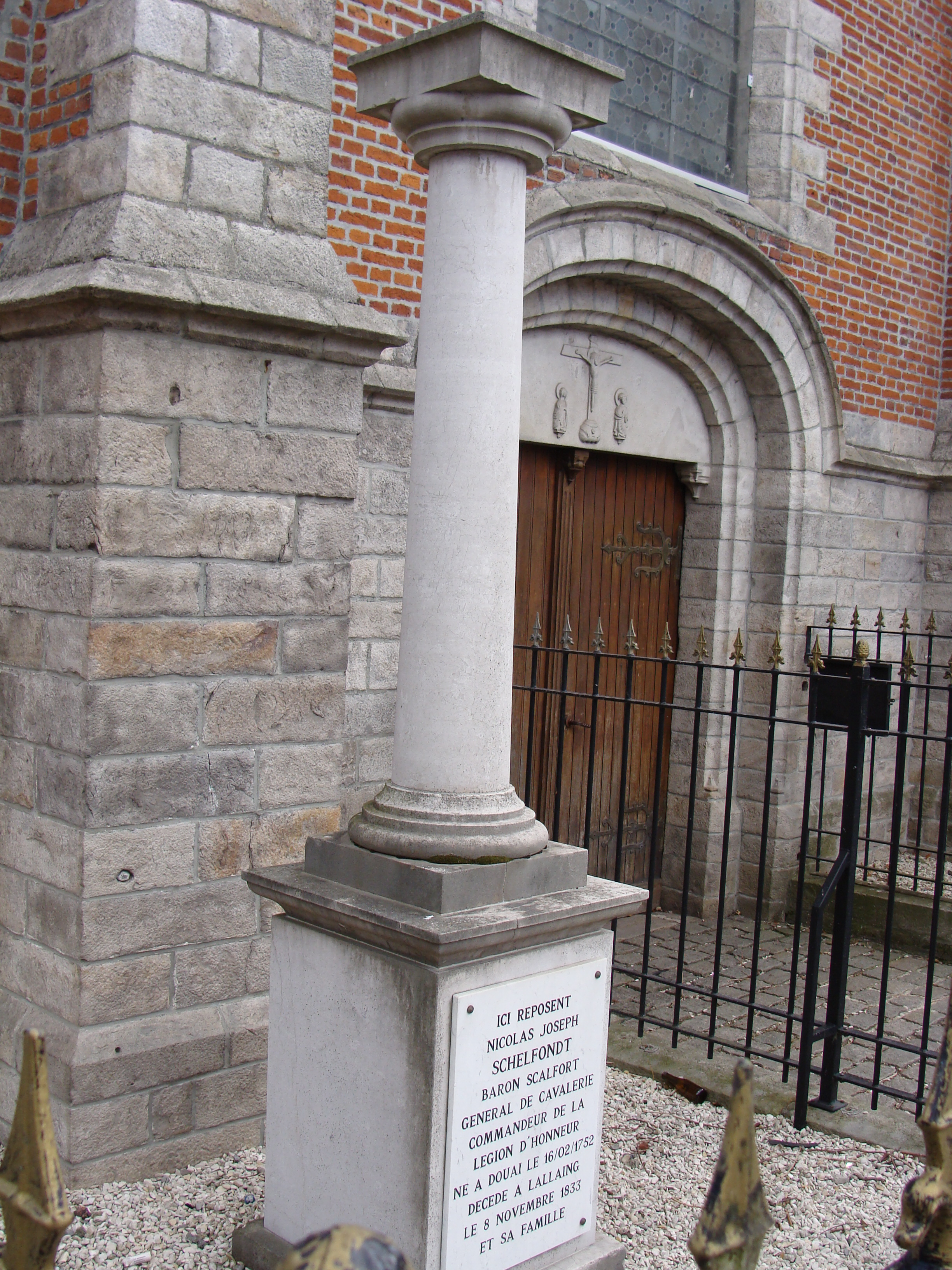 Lallaing - stèle funéraire du baron Scalfort - Nicolas-Joseph Schelfondt